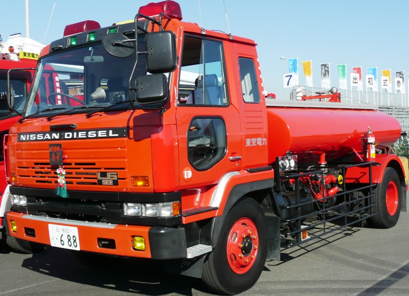 東京電力の水槽車。東京消防出初式にて撮影。